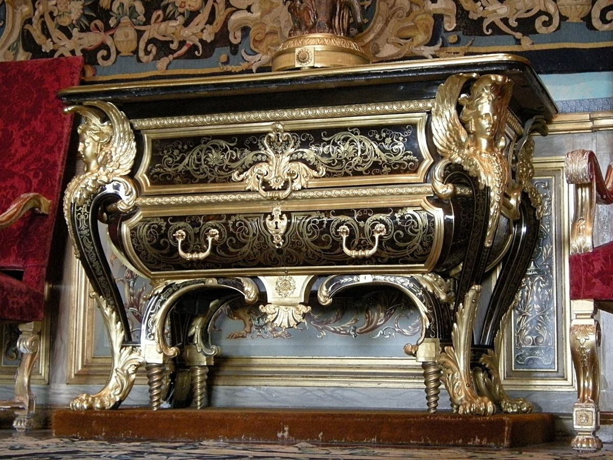 Commode "Mazarine" par André-Charles Boulle, femmes ailées en bronze doré dans les angles (Château de Vaux-le-Vicomte)